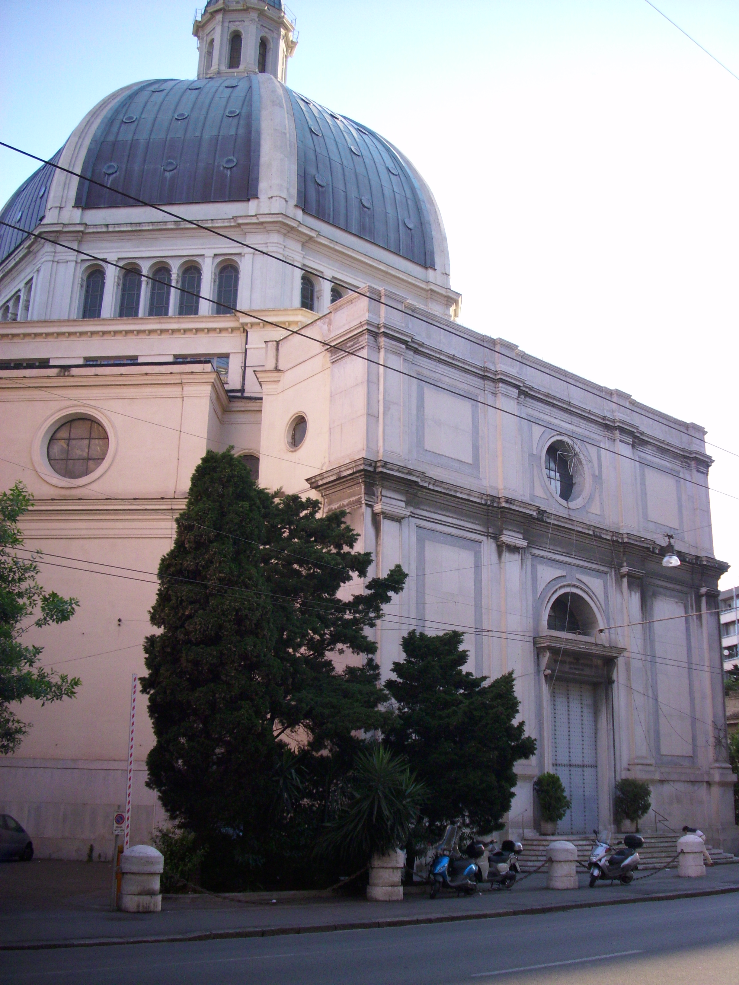 Chiesa di Nostra Signora Assunta e Santa Zita a Genova, nel quartiere di Borgo Pila.